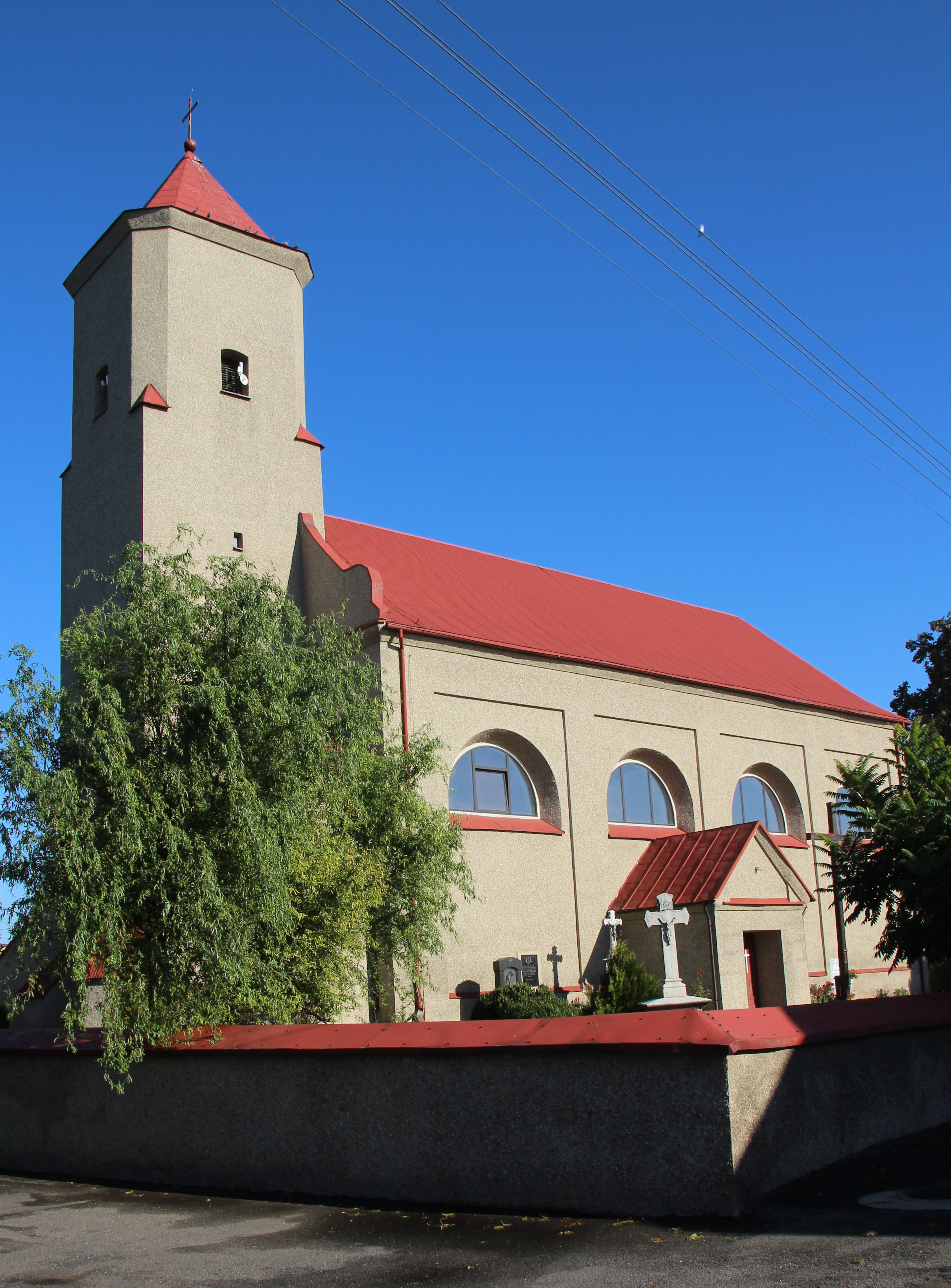 Suchej Psina - rzymskokatolicki kościół parafialny pw. św. Jodoka, 1714, XIX w., 1958